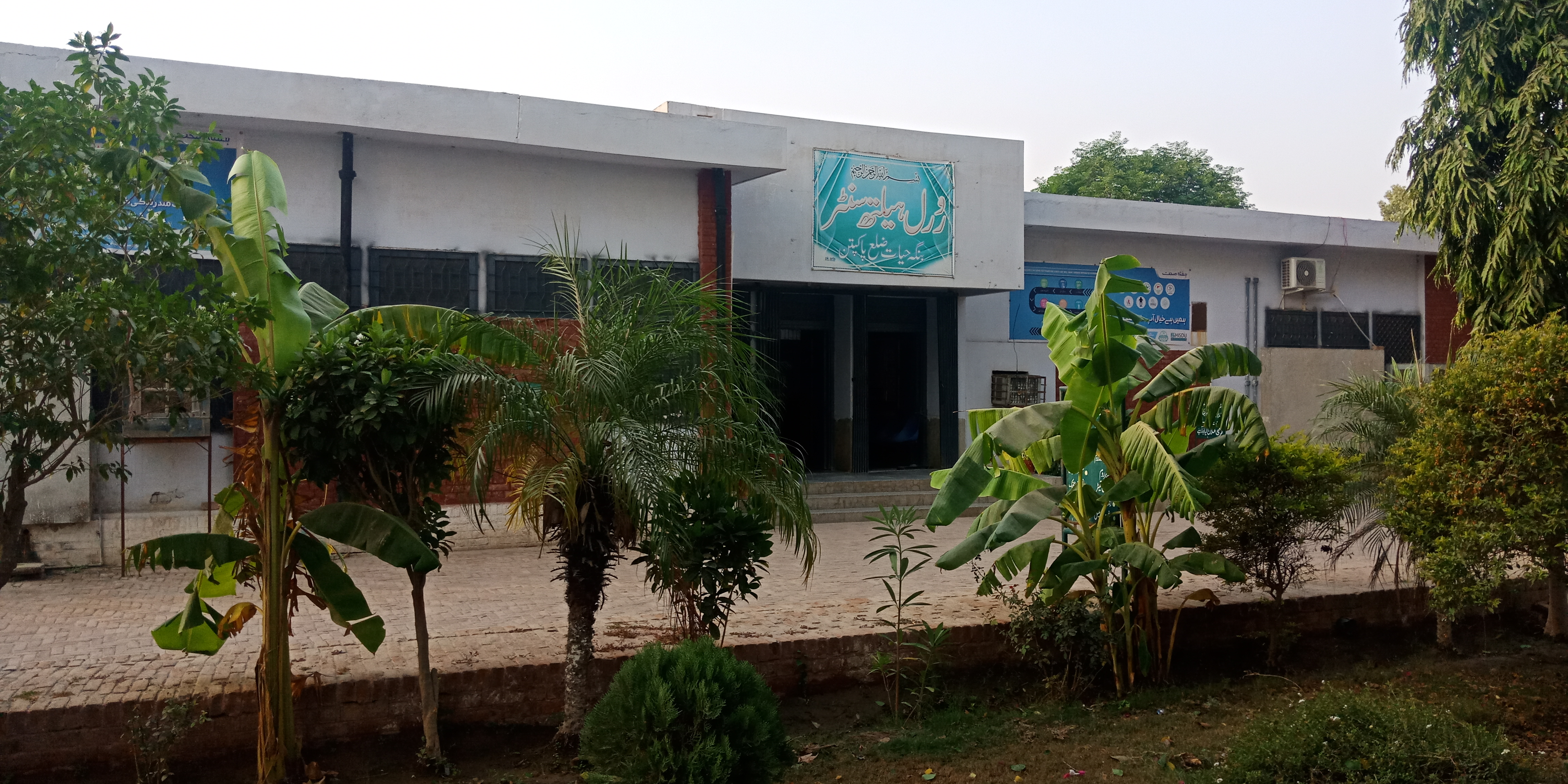 RHC Hospital, Bunga Hayat